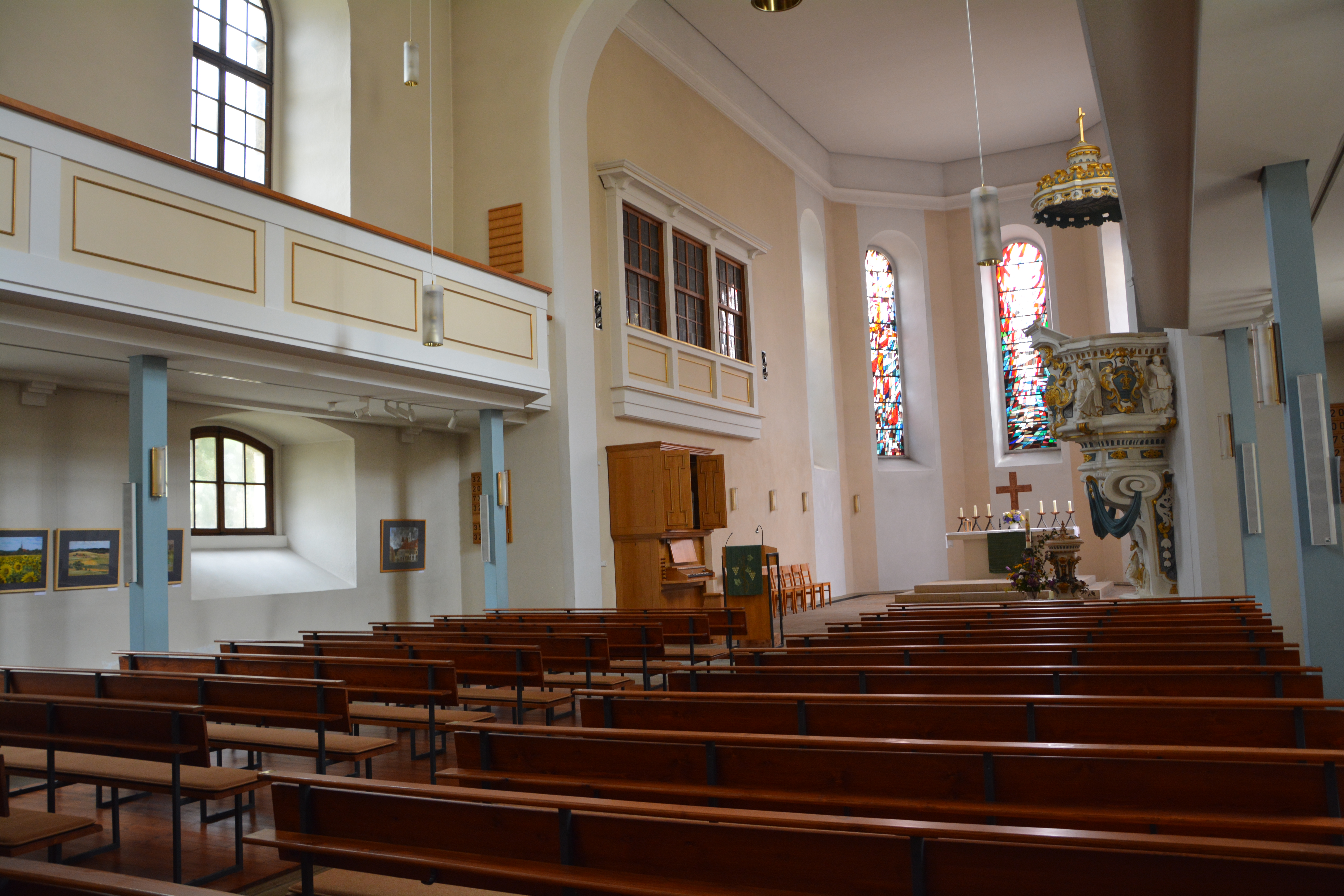 Stadtkirche "Zum Heiligen Namen Gottes" Radeberg, Innenansicht